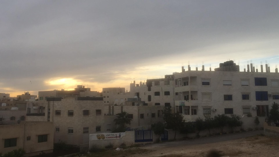 صورة لأحد الأحساء السكنية في لواء القويسمة أحد المناطق في العاصمة عمان،يظهر بها أحد رياض الأطفال